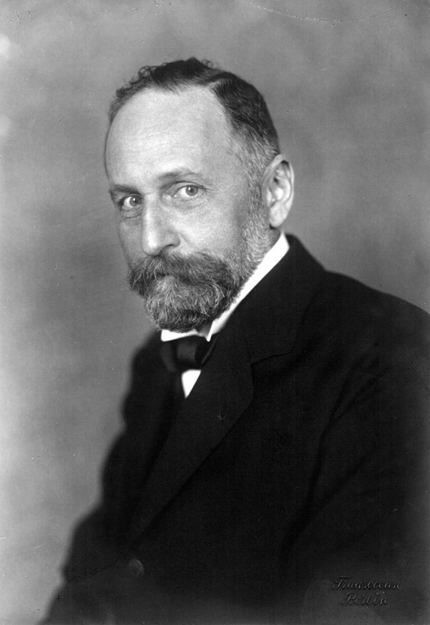 Richard Martin Willstätter (* 13. August 1872 in Karlsruhe; † 3. August 1942 in Muralto), Kaiser-Wilhelm-Institut für Chemie in Berlin-Dahlem.